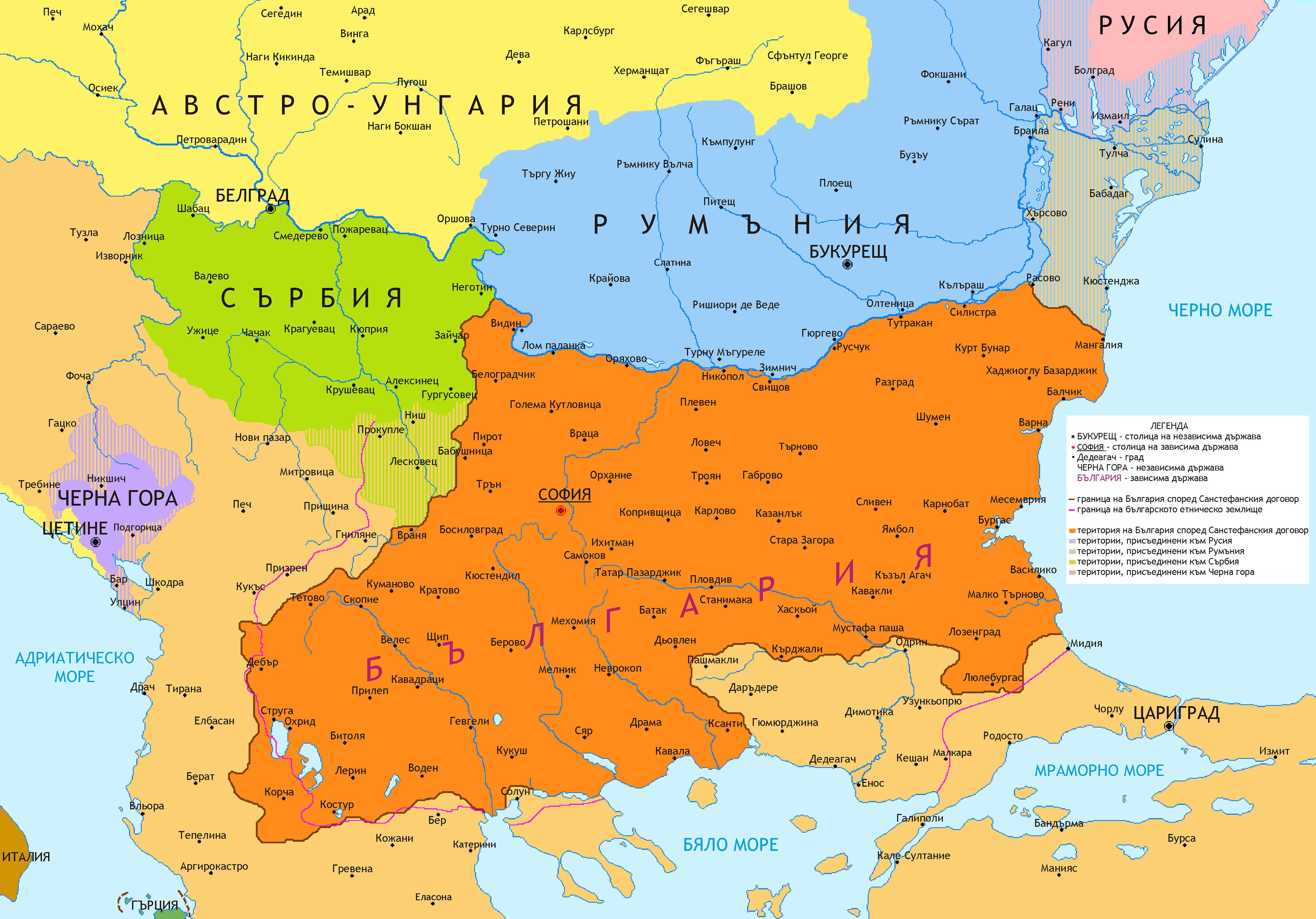 Карта на Санстефанска България